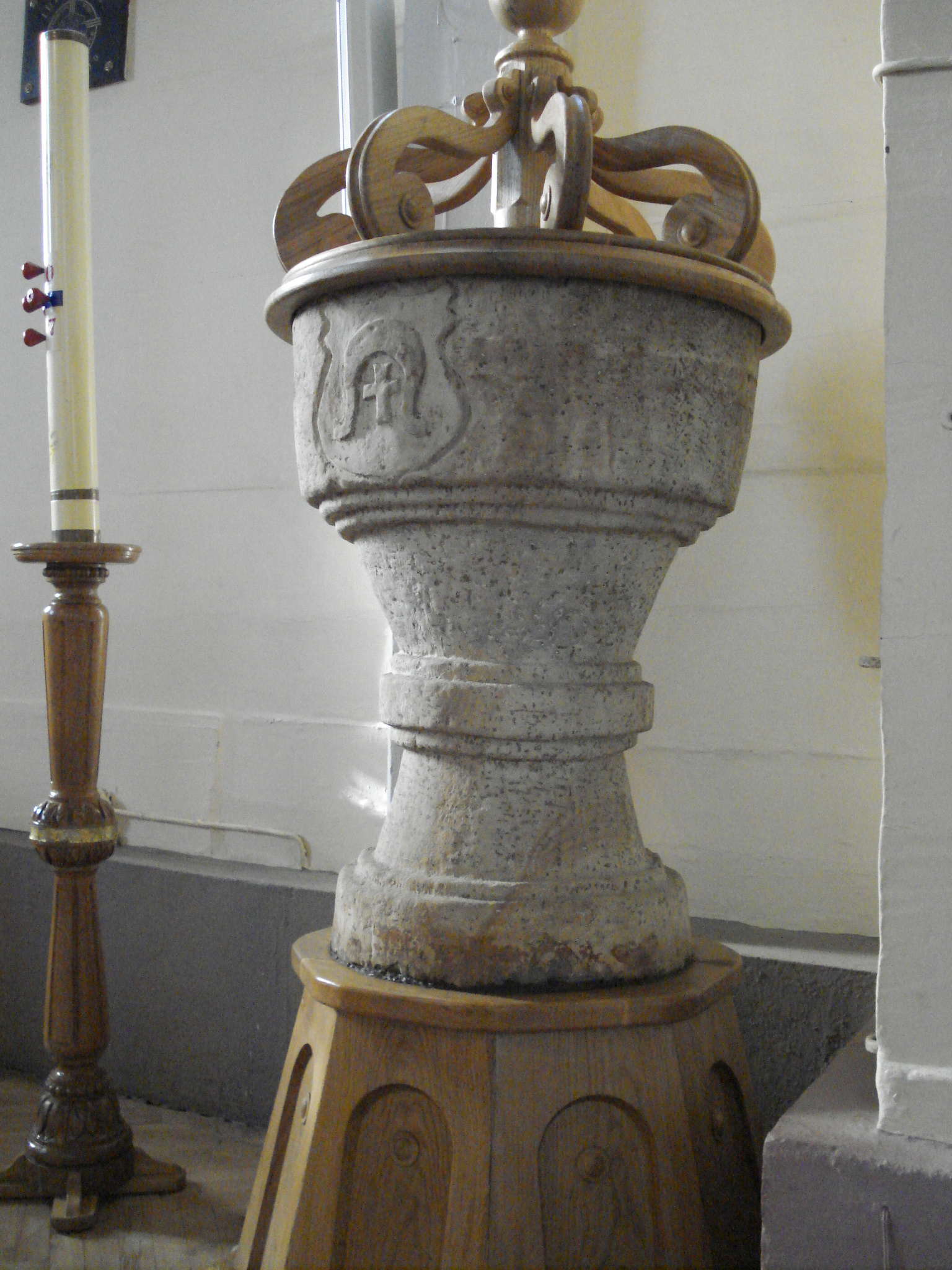 Gotycka chrzcielnica z przełomu XV i XVI wieku z kościoła pod wezwaniem. św. Jakuba Apostoła w Leźnicy Wielkiej